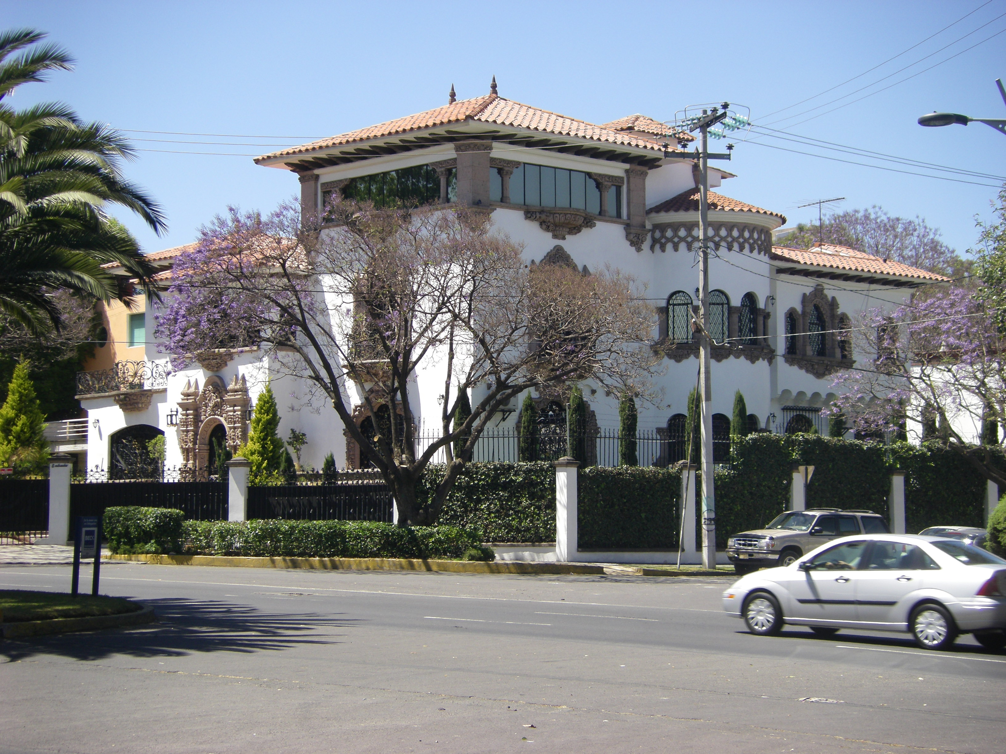 Schlossähnliche Villa in Mexiko-Stadt